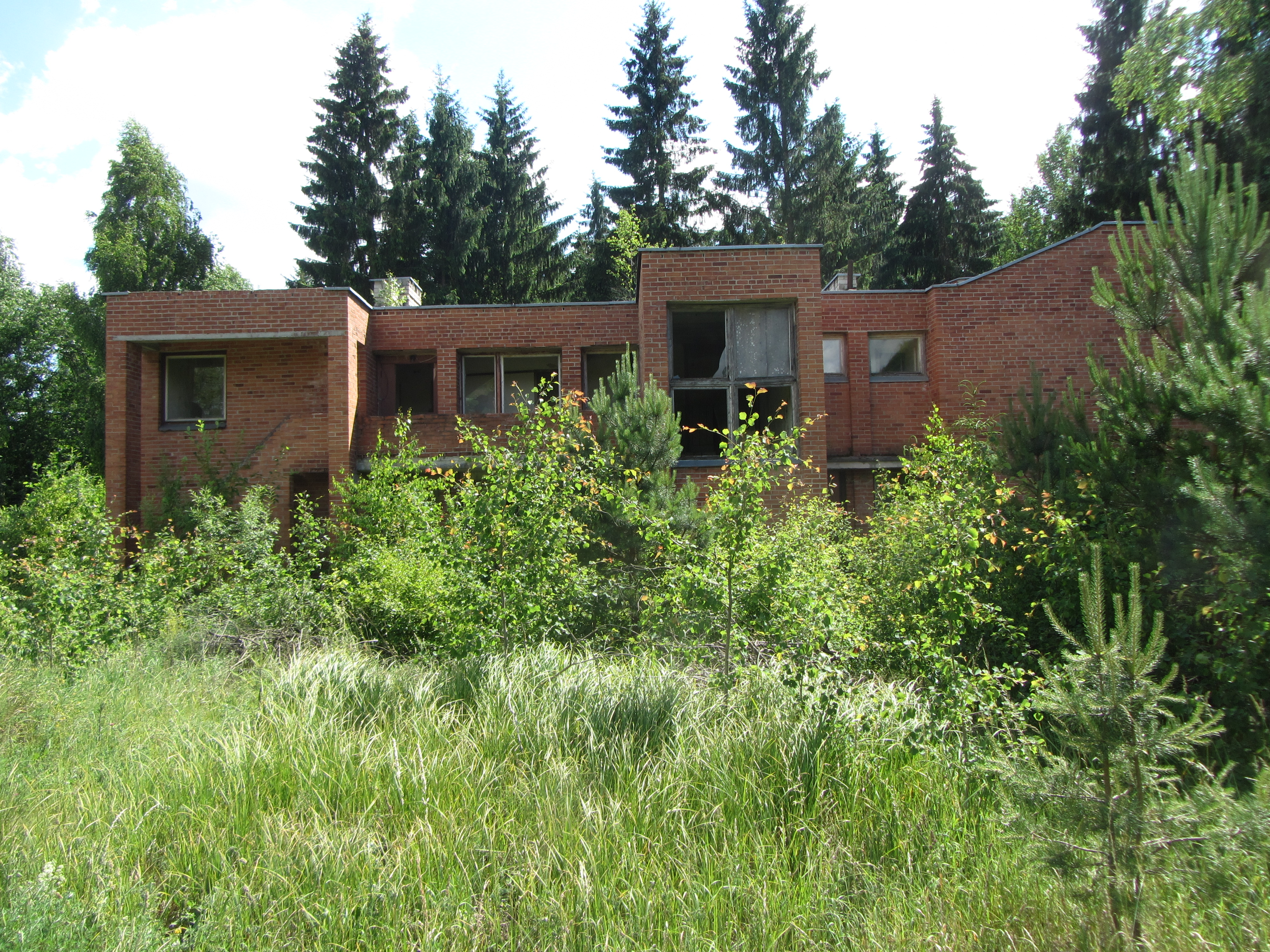 Trakų sen., Lithuania